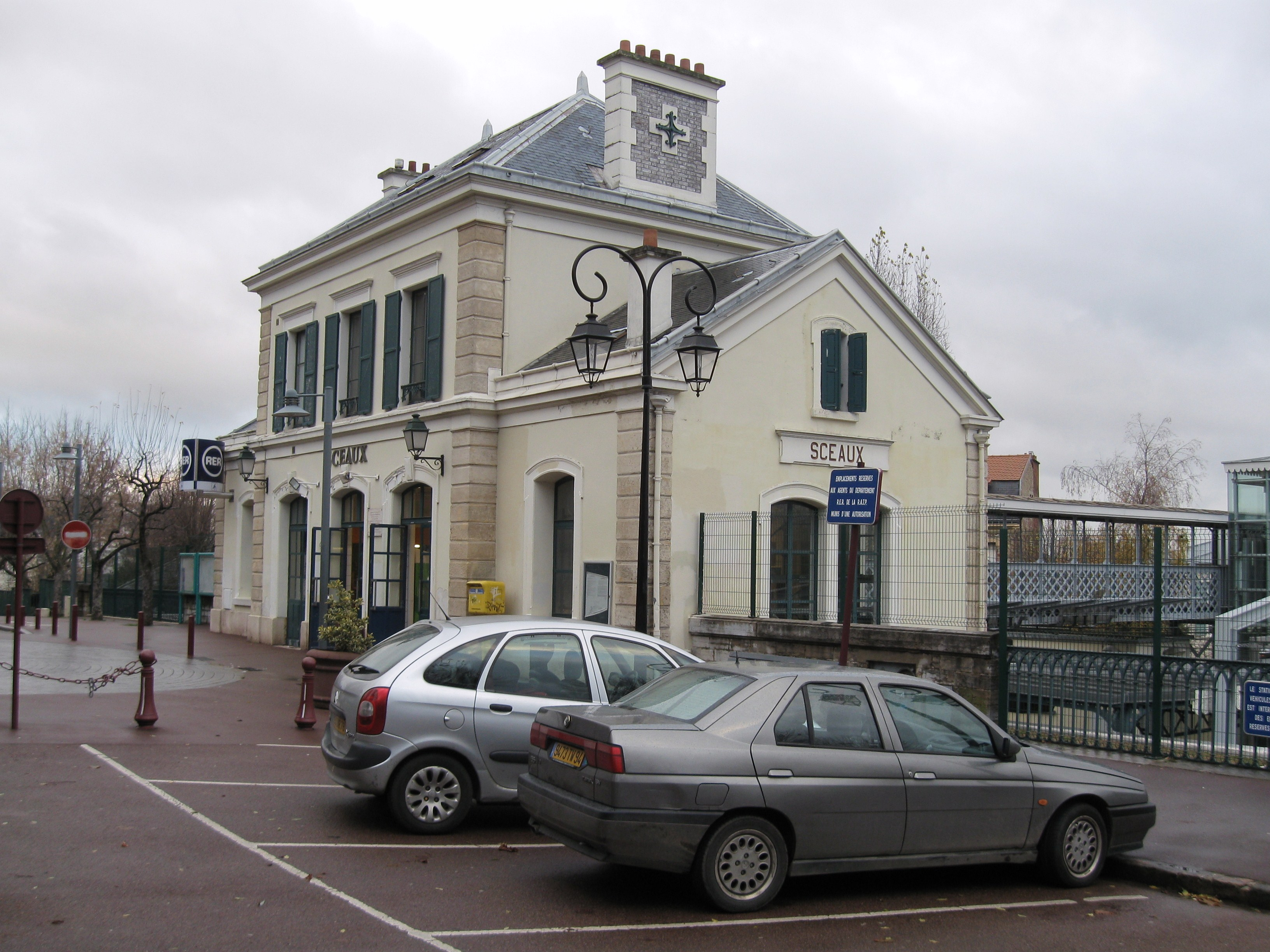 Gare de Sceaux, façade extérieure, Sceaux, Hauts-de-Seine, France